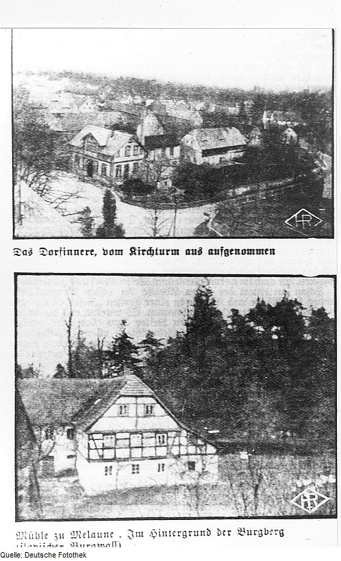 Original image description from the Deutsche Fotothek Vierkirchen-Melaune. Mühle zu Melaune, aus: Die Heimat Nr. 35 (1932)